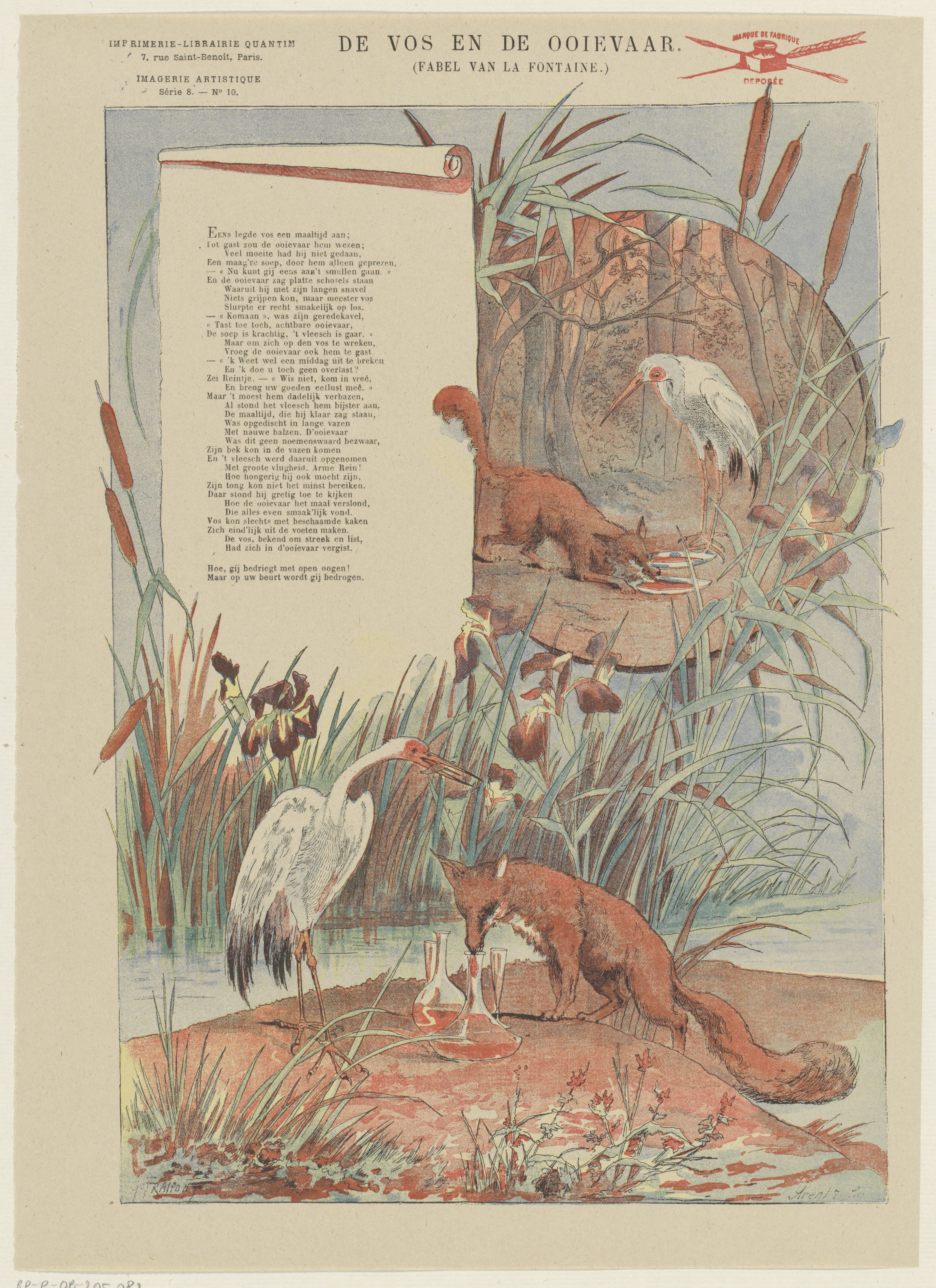 IdentificatieTitel(s): De vos en de ooievaar (titel op object)Fabel van La Fontaine (serietitel op object)Imagerie Artistique / Série 8 (serietitel op object)Objecttype: prent volksprent Serienummer: 10/20Objectnummer: RP-P-OB-205.982Opschriften / Merken: verzamelaarsmerk, verso, gestempeld: Lugt 2760octrooivermelding, recto rechtsboven, gestempeld: ‘marque de fabrique / deposée’, rode stempel met inktpot, pen en schrijfveerOmschrijving: Blad met een grote voorstelling uit de fabel van Jean de La Fontaine, van de vos en de ooievaar. Linksboven een tekstblok met versregels. Genummerd linksboven: Série 8. - No. 10.VervaardigingVervaardiger: prentmaker: Arents (prentmaker) (vermeld op object)ontwerper: Gustave Fraipont (vermeld op object)uitgever: Albert Quantin (vermeld op object)Plaats vervaardiging: ParijsDatering: 1876 - 1890 en/of 1890Fysieke kenmerken: kleurenlithografie en tekst in boekdrukMateriaal: papier Techniek: kleurenlithografie (procedé) / boekdrukAfmetingen: blad: h 367 mm × b 266 mmOnderwerpWat: fabelsbeasts of prey, predatory animals: foxshore-birds and wading-birds: storkVerwerving en rechtenCredit line: Schenking van de heer F.G. Waller, AmsterdamVerwerving: schenking 1923Copyright: Publiek domein